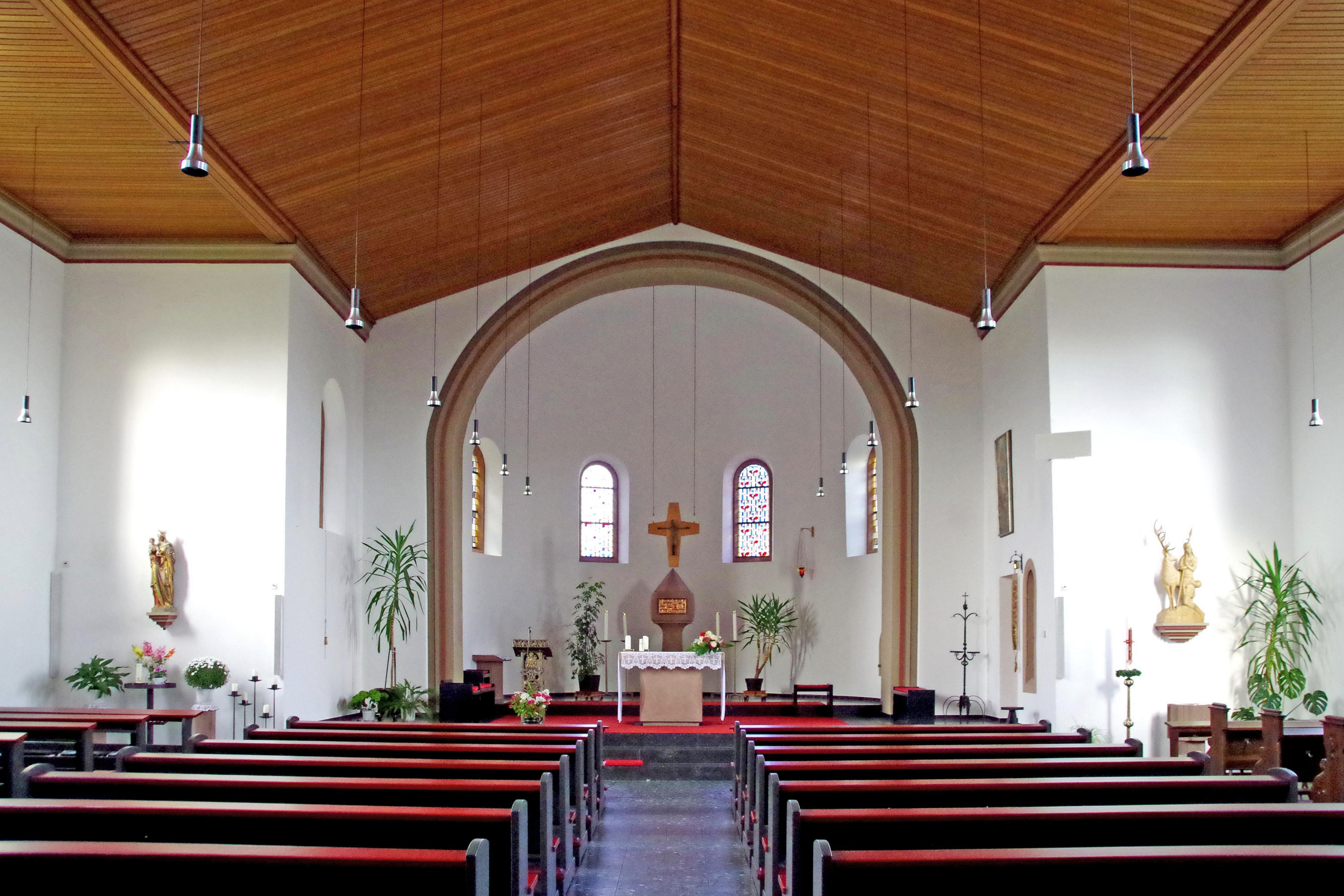 St. Hubertus (Udenbreth), Innenraum nach Osten mit Altar